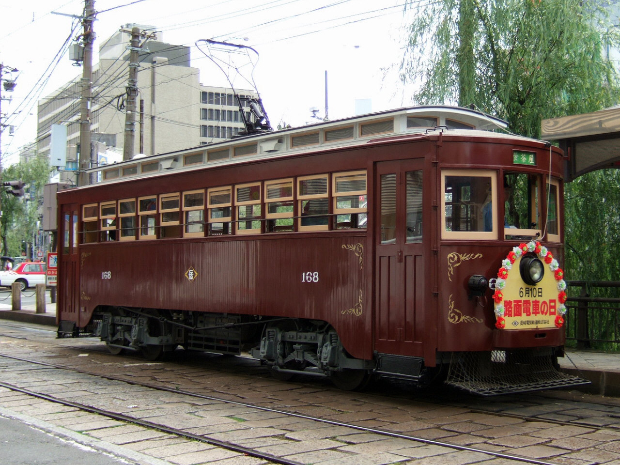 長崎電気軌道160形電車168号（路面電車の日運行、西浜町電停にて）